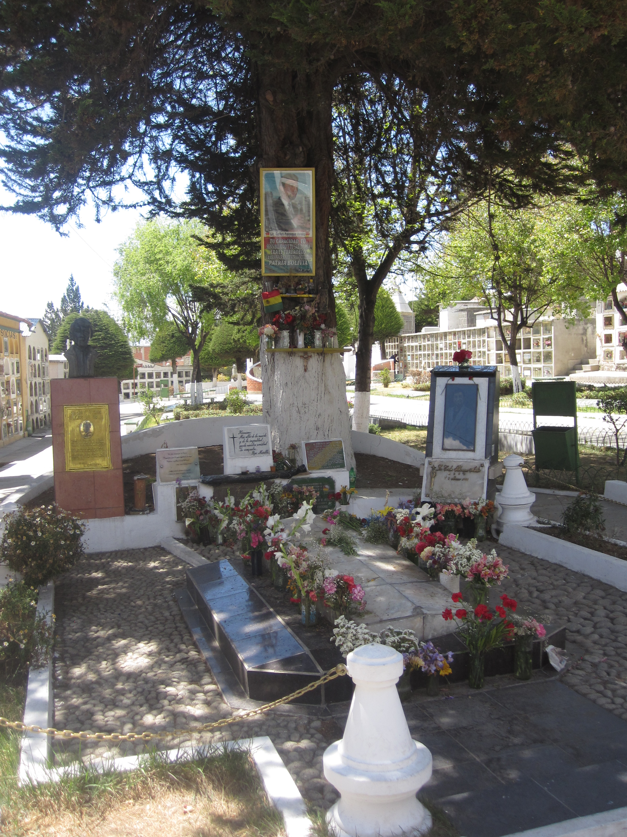 Cementerio General de La Paz This medium shows the protected monument with the number L/F0-001 in Bolivia.